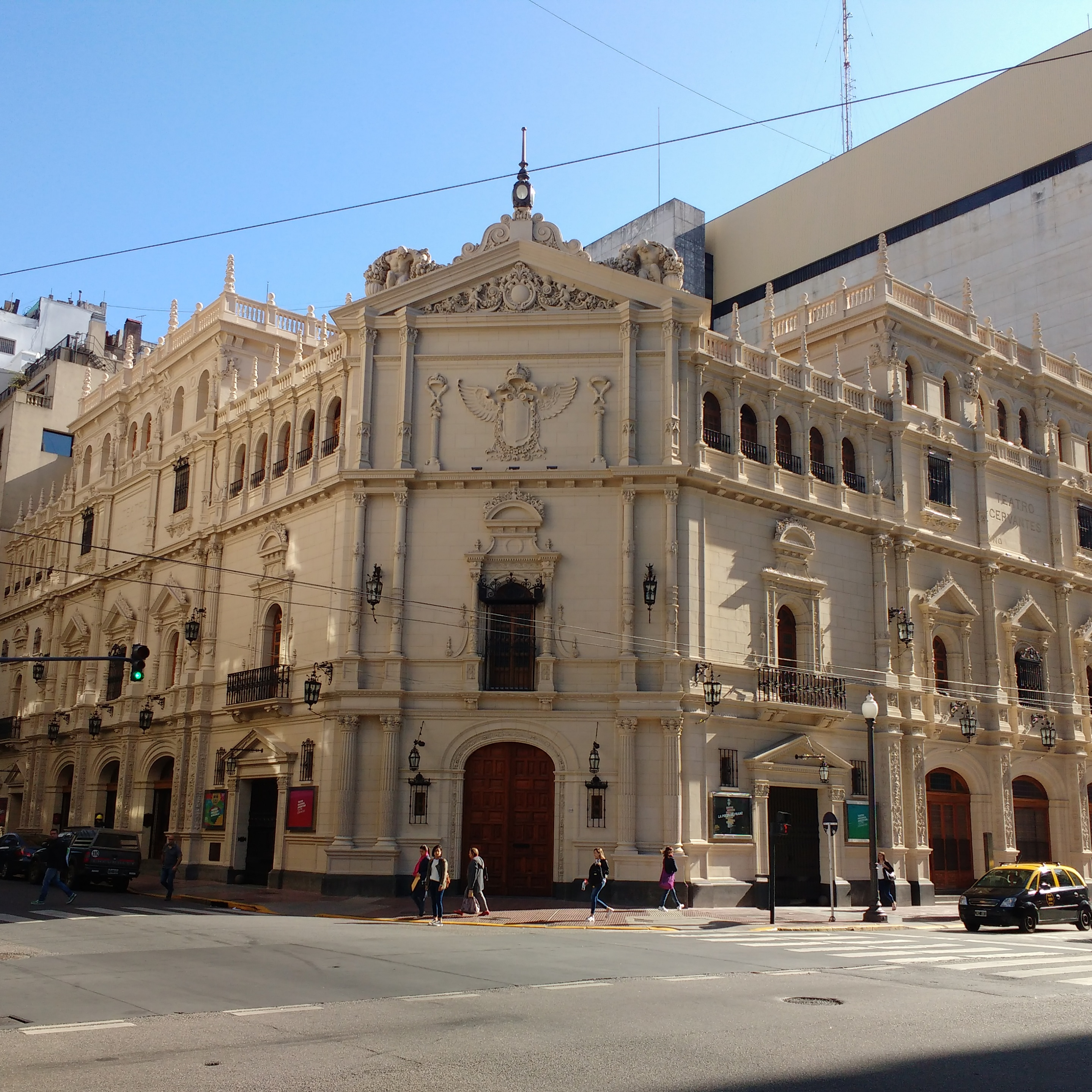 Reparación y puesta en valor de fachada